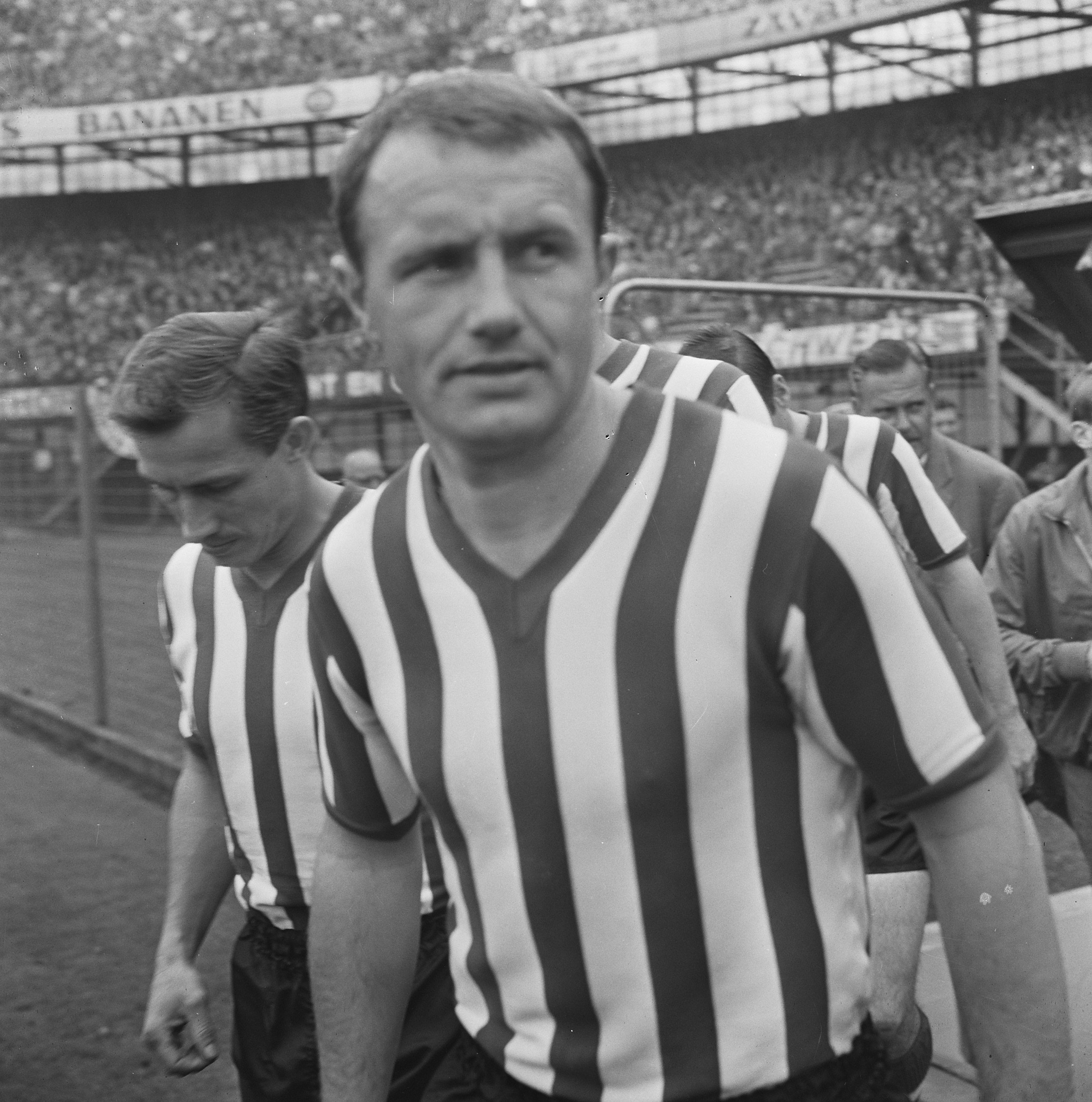 Collectie / Archief : Fotocollectie Anefo Reportage / Serie : Voetballers van de Rotterdamse club Sparta Beschrijving : Voetballer Ad Verhoeven van Sparta Datum : 1 november 1965 Locatie : Rotterdam, Zuid-Holland Trefwoorden : portretten, sport, voetbal Persoonsnaam : Verhoeven, Ad Fotograaf : Koch, Eric / Anefo Auteursrechthebbende : Nationaal Archief Materiaalsoort : Negatief (zwart/wit) Nummer archiefinventaris : bekijk toegang 2.24.01.03 Bestanddeelnummer : 918-3927